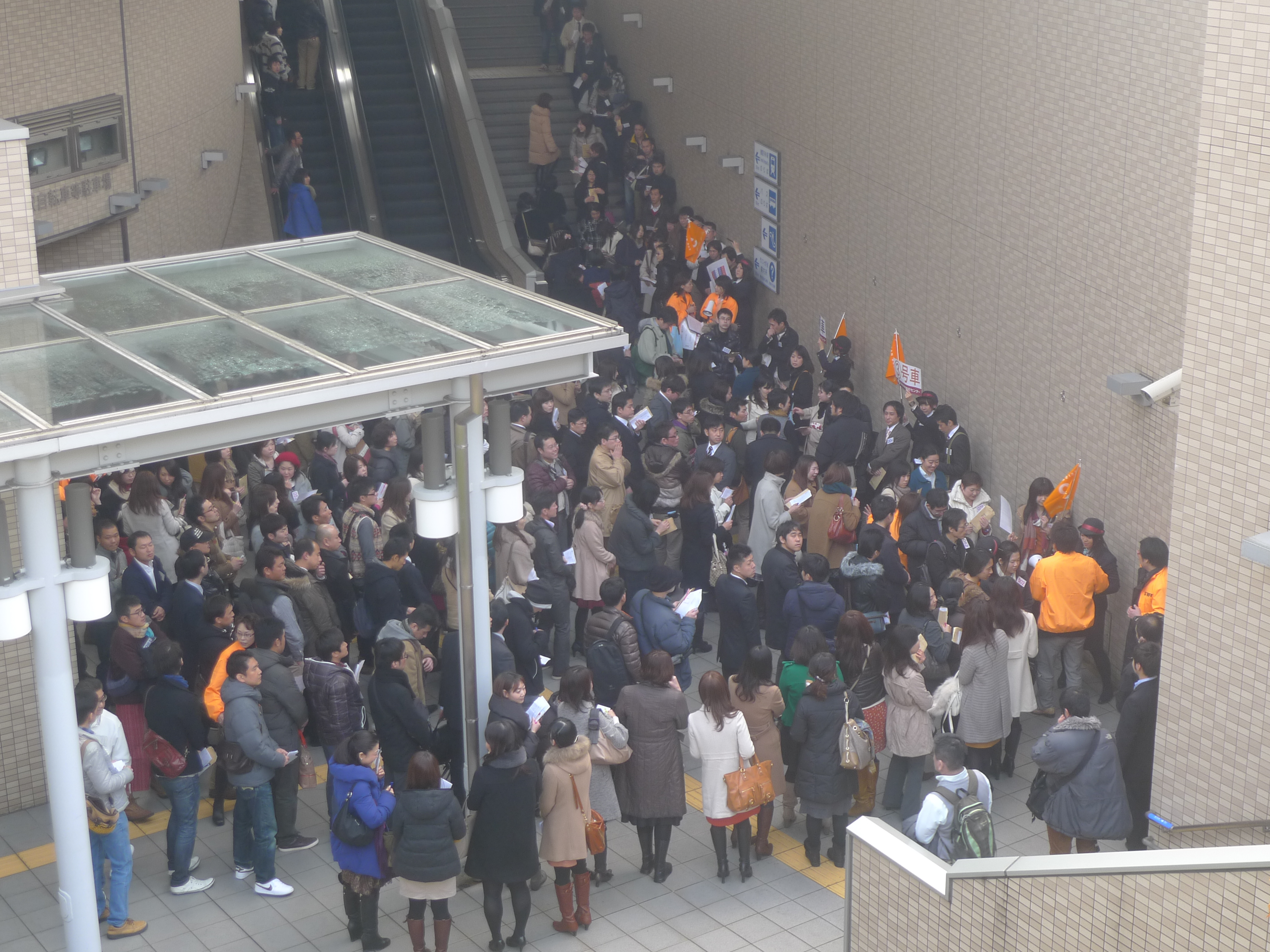 エンタメ系婚活 ドクダツ京都市営地下鉄を占拠せよ！太秦天神川駅をJACK風景。